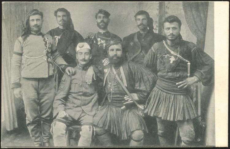 Апостолис Матопулос с младотурчина Халил бей след Хуриета.